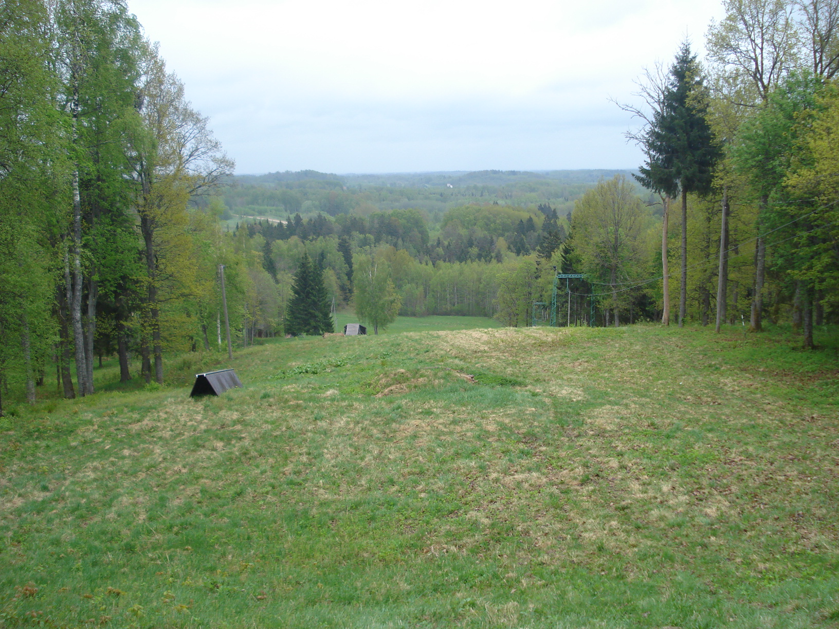 Вид с холма Гайзинькалнс